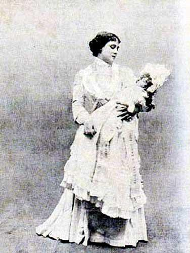 La actriz española Matilde Moreno, representando la obra de teatro Electra, de Benito Pérez Galdos